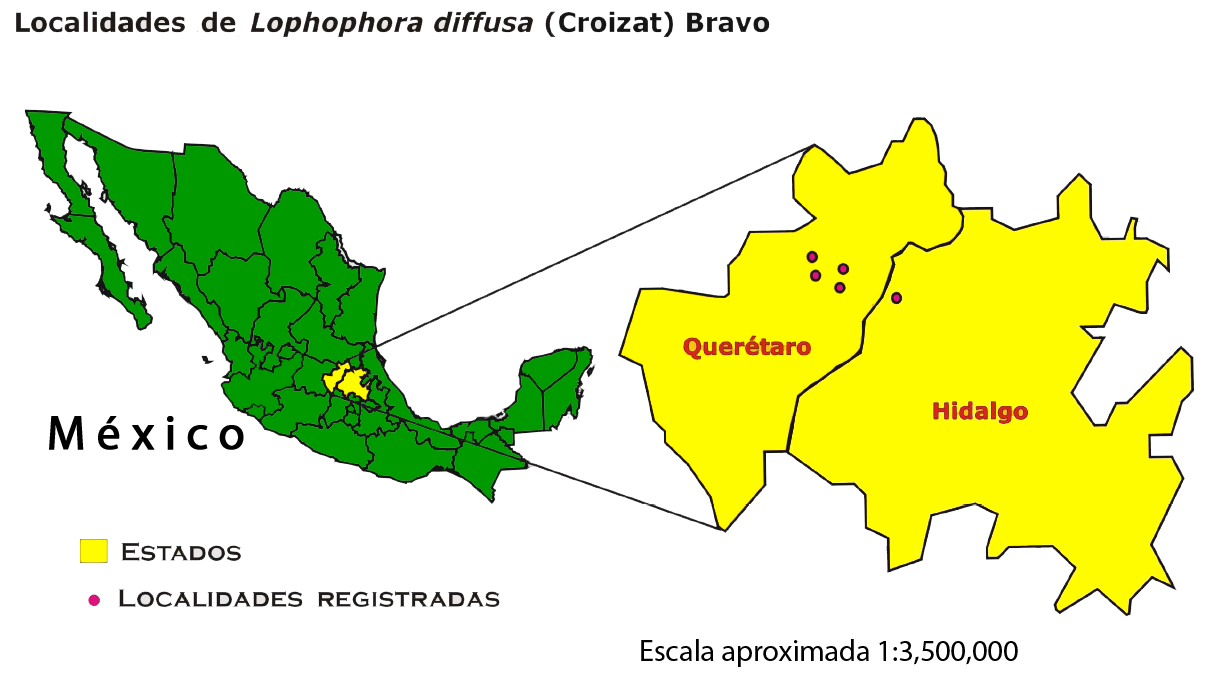 Distribución regional de Lophophora diffusa. Querétero e Hidalgo.